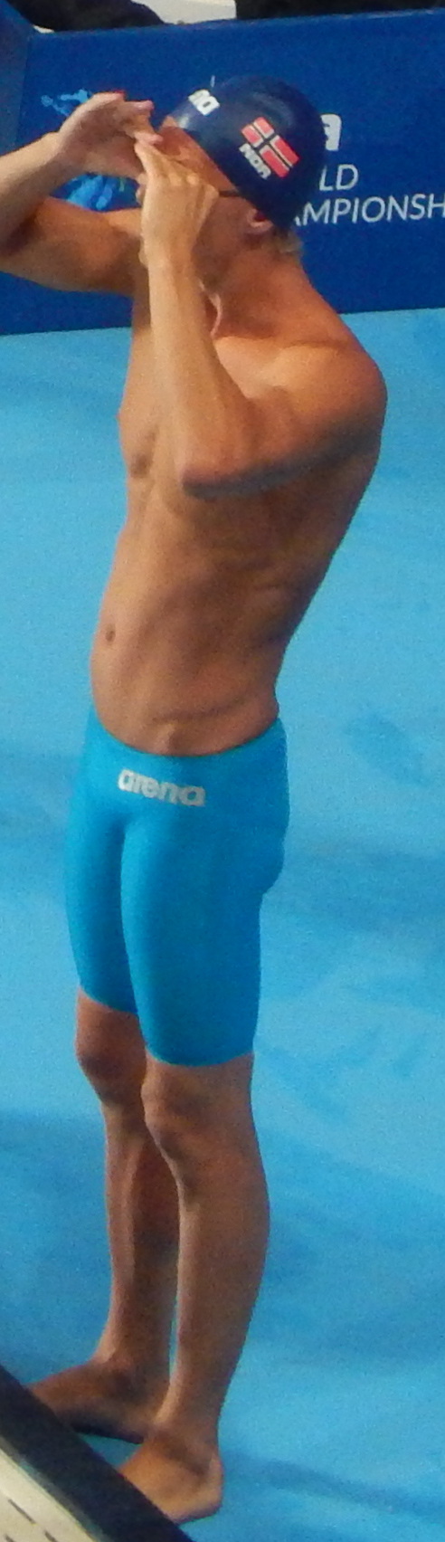 Лавранс Солли в финале на дистанции 50 метров на спине в Казани